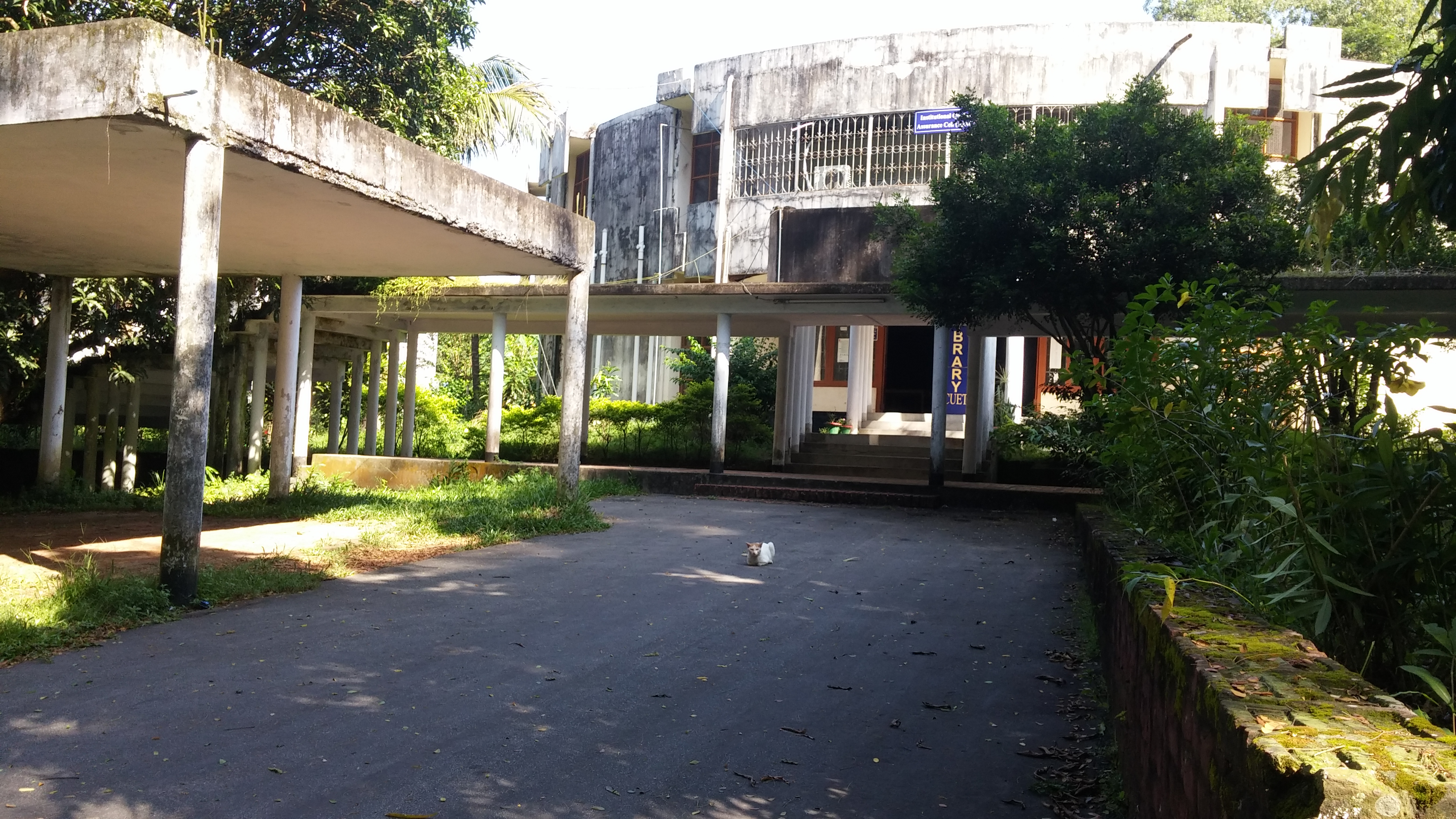 কেন্দ্রীয় লাইব্রেরি। Central Library